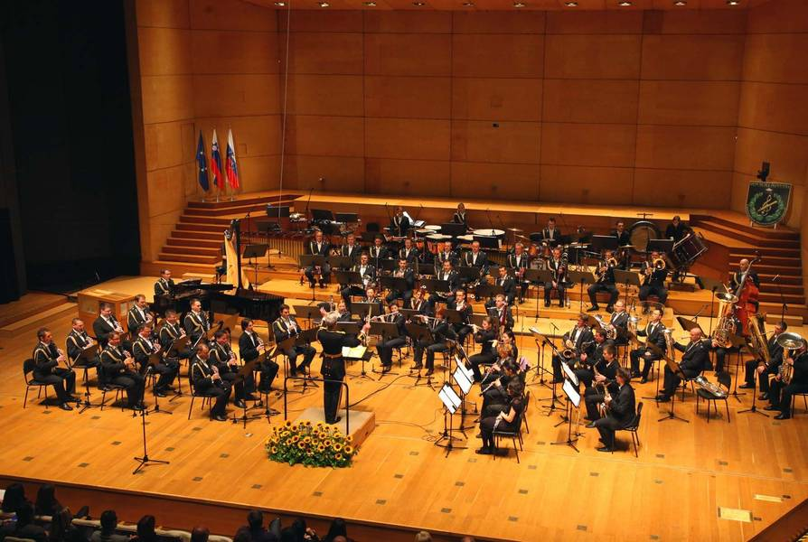 Koncert Orkestra Slovenske vojske v Gallusovi dvorani Cankarjevega doma